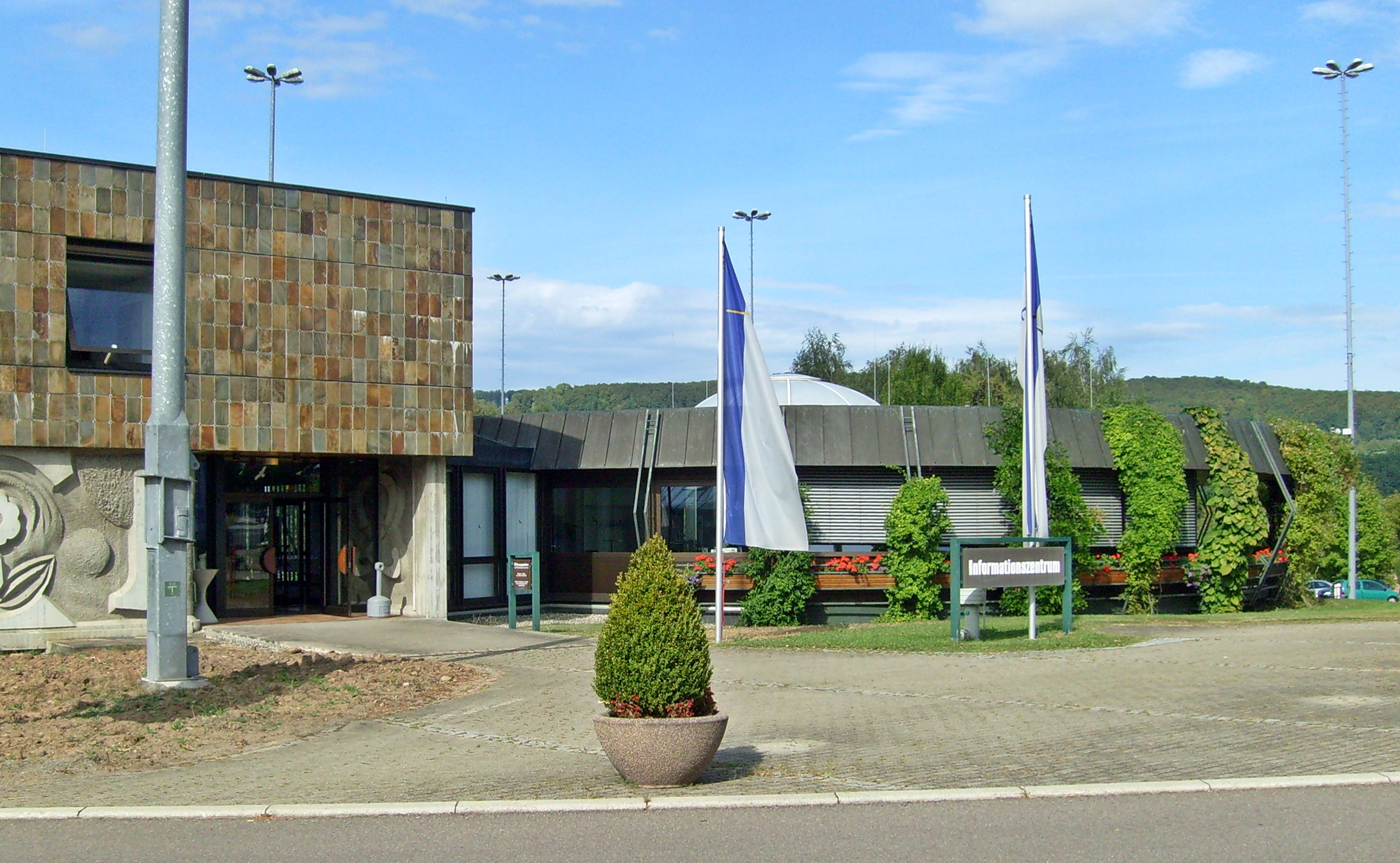 Das Infozentrum des Kernkraftwerks Obrigheim